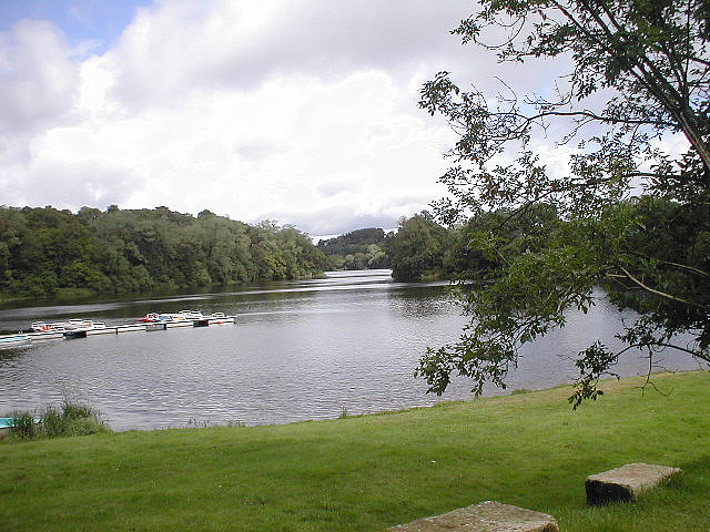 Lac de Bosméléac